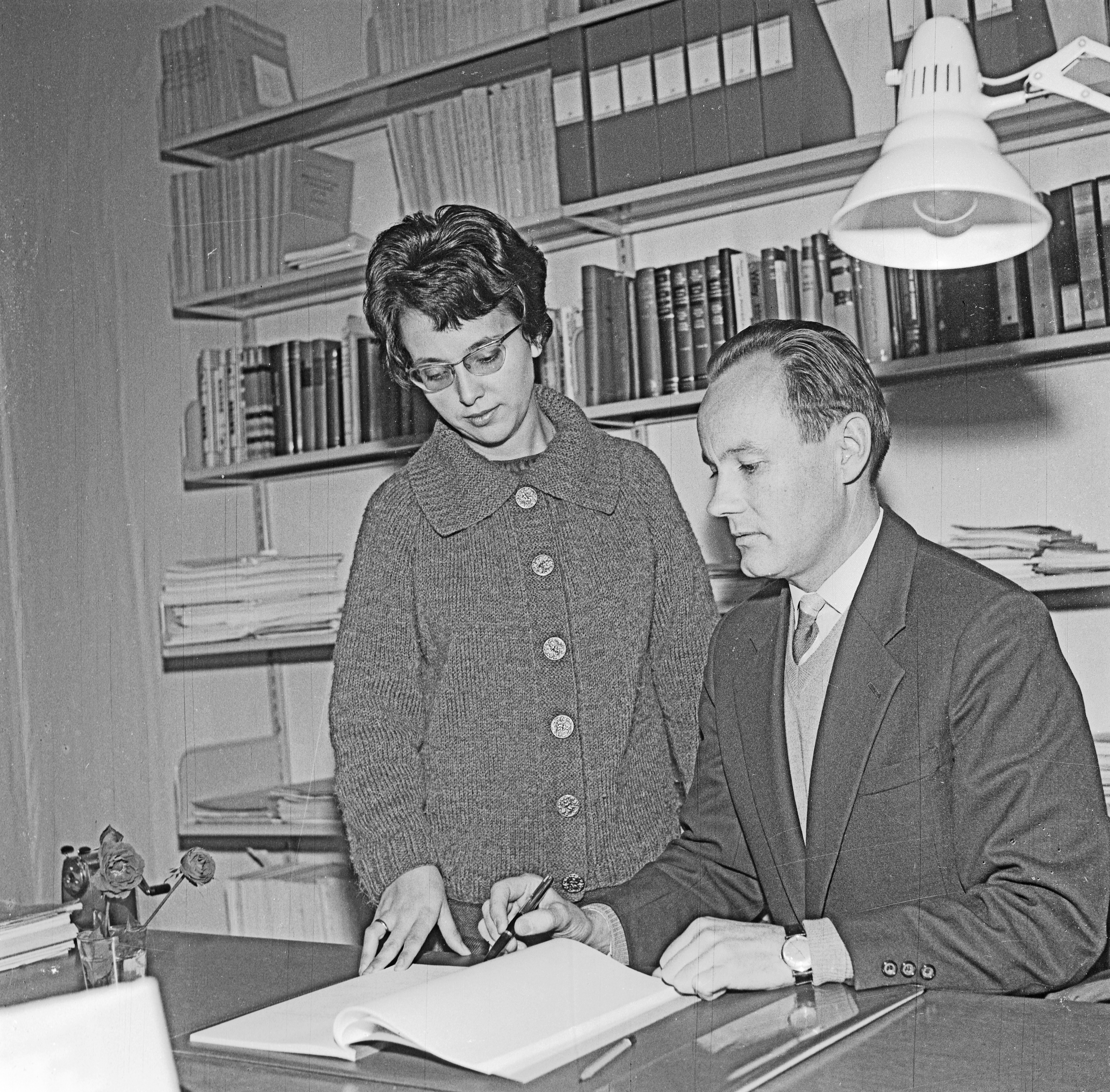 Format: Negativ 120 film Dato / Date: 21 November 1962 Fotograf / Photographer: Eirik Sundvor (1902 - 1992) Sted / Place: Universitetet i Bergen Wikipedia: Sigve Tjøtta (f. 1930) Wikipedia: Jacqueline Naze Tjøtta (f. 1935) Wikipedia: Akustikk Wikipedia: Hydrodynamikk Eier / Owner Institution: Trondheim byarkiv, The Municipal Archives of Trondheim Arkivreferanse / Archive reference: Tor.H43.Bxx.F14432 Merknad: Professorparet Sigve og Jacqueline Tjøtta. Sigve (f. 1930 i Klepp) ble professor i anvendt matematikk i 1962. Jaqueline (f. 1935 i Montpellier) ble i 1966 den første kvinnelige og den yngste noensinne professor ved Det matematisk-naturvitenskapelige fakultetet i Bergen. Paret giftet seg i 1964. TJØTTA Jacqueline Andrée Naze, professor, dr., Bergen, f. 1. juni 1935 i Montpellier, Frankrike, dtr. av musiker Maurize André Naze, f. 1905 og Renée Marie Marthe Courbet, f. 1914. Gift 1964 nedenn. prof. Sigve Tjøtta. Licence es Sciences Univ. i Marseille 1955, Agrégation de Mathématiques 1956, dr. i matematikk Sorbonne 1961. Univ.lærer i Lille, Frankrike 1961, stip. Norges Tekn.-Naturvitensk. Forskningsråd og Univ. i Bergen 1963, prof. i anvendt matem. Univ. i Bergen siden 1966. Skr. vitensk. arb. i kinetisk teori, magneto-hydrodynamikk og teor. akustikk. TJØTTA Sigve, professor, dr. philos., Bergen, f. 1. mars 1930 i Klepp, sønn av bonde Sigvald T., f. 1894 og Anna Maria Hauge (1891-1966). Gift 1964 ovenn. prof. Jacqueline N. Tjøtta. St. 1950, cand. real. 1954, dr. philos. Univ. i Oslo 1960, stud. USA 1956-57, Tyskland 1958-59. Vitensk. ass. og stip. Univ. i Oslo, dosent Univ. i Bergen 1960, prof. i anvendt matem. siden 1963. Skr. vitensk. arb. i teor. akustikk, hydrodynamikk, magneto-hydrodynamikk og teor. plasmafysikk. [Fra Hvem er hvem? 1973]